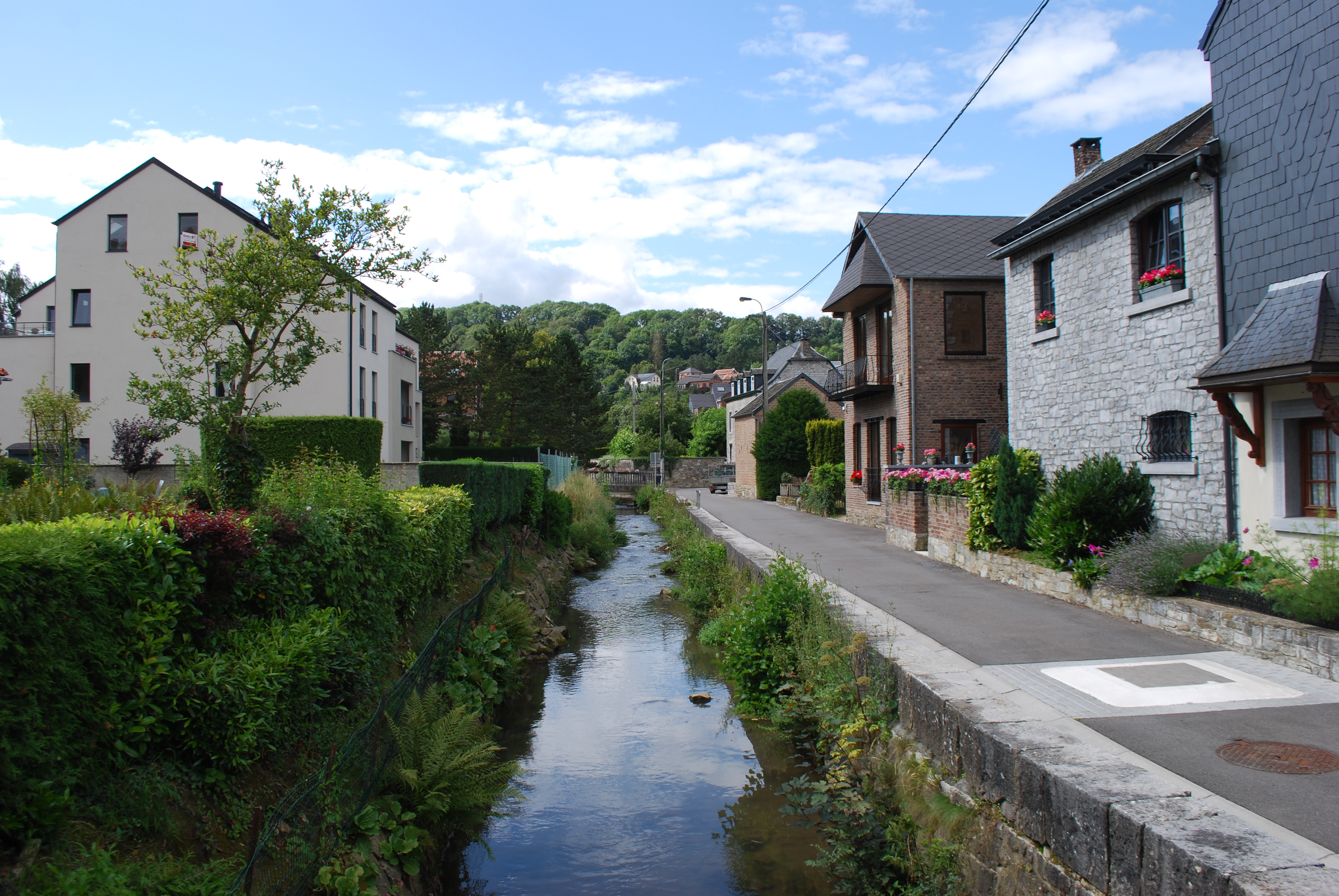 Vue de la rue du Vieux-Moulin à Hamoir.